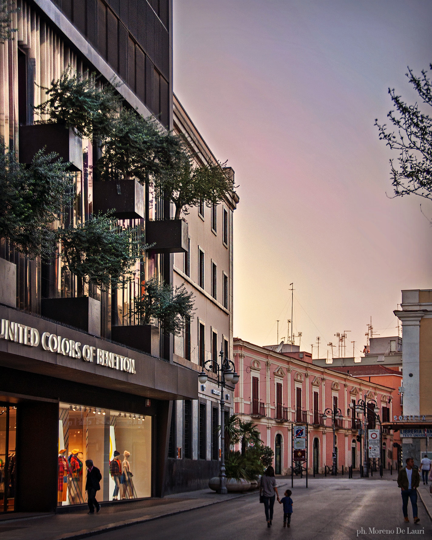 Palazzo Benetton a Foggia, con istallazione di ulivi verticali.